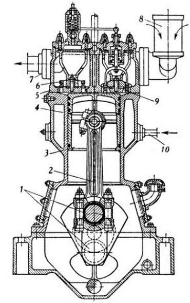 Կոմպրեսոր: Նկ.1